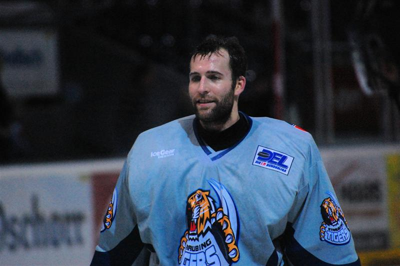 Markus Janka